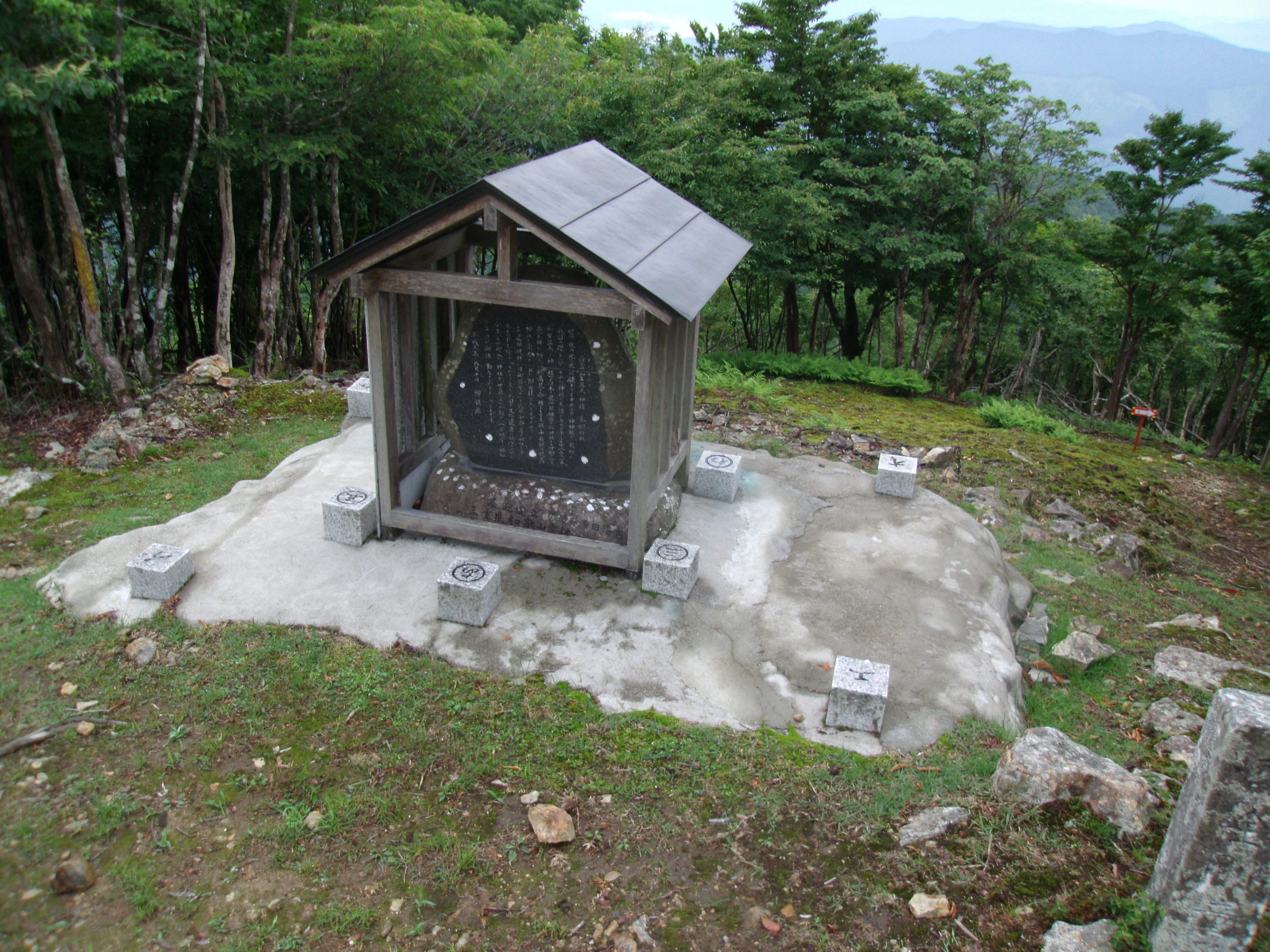 大峯奥駈道第18靡「笠捨山」山頂の祠